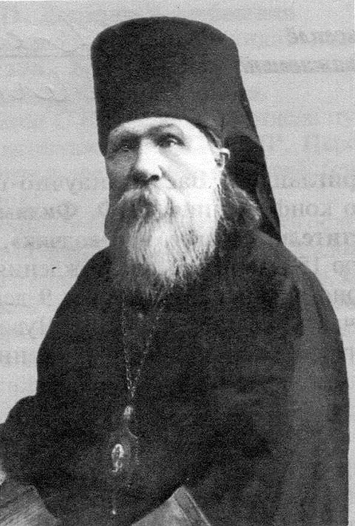 Даниил Филимонов